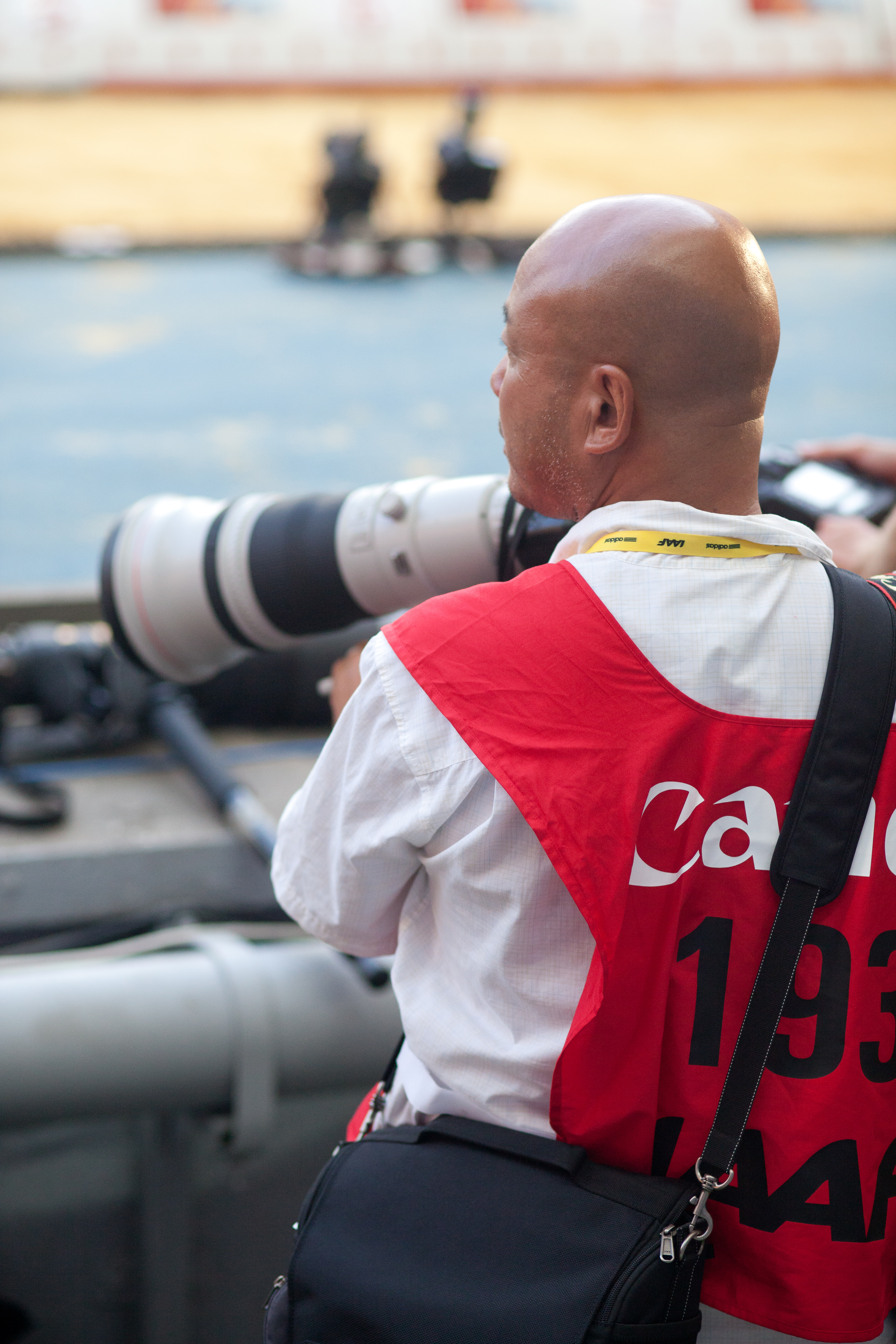 Первый день Чемпионата мира по легкой атлетике в Москве